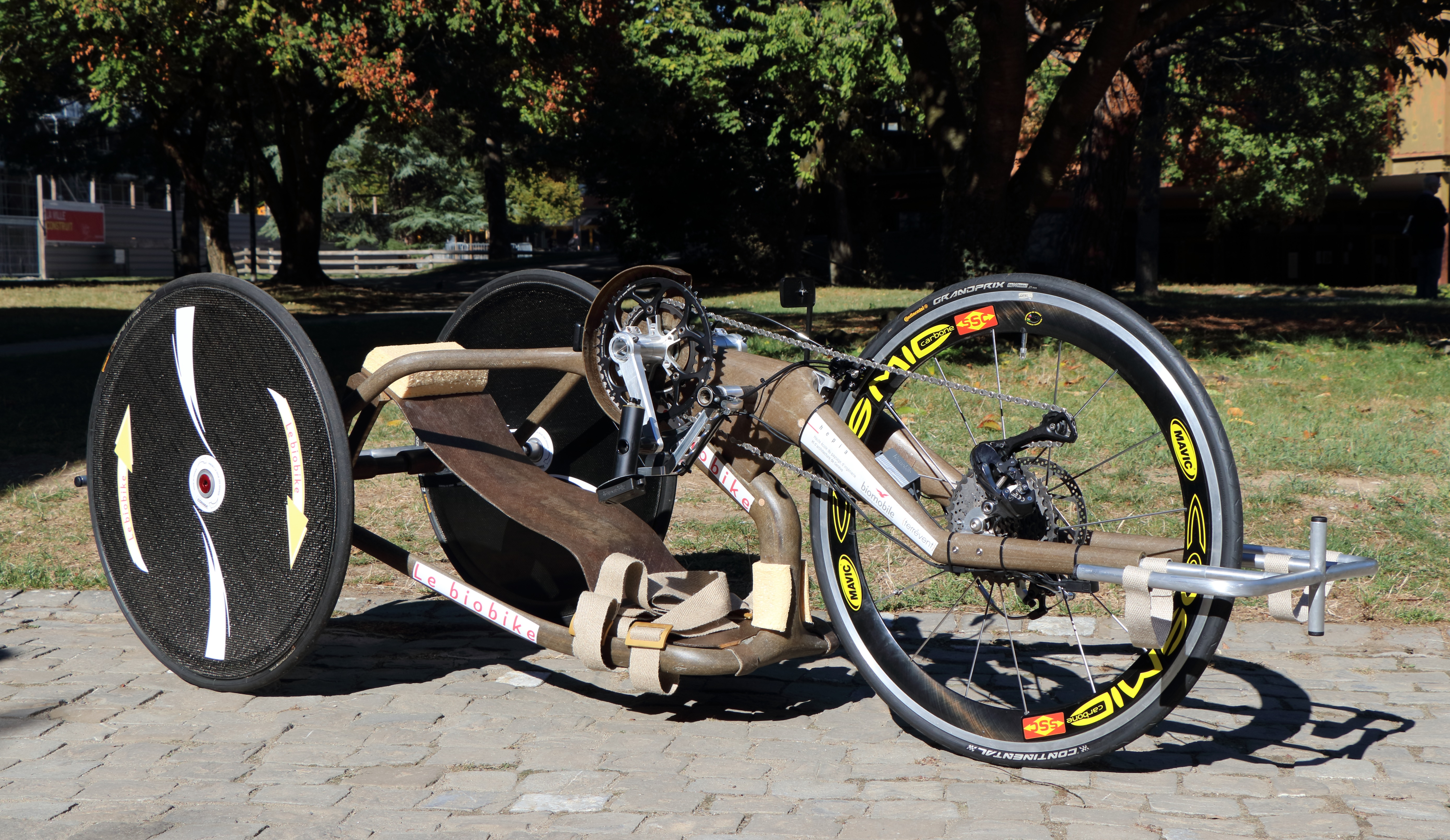 Le biobike